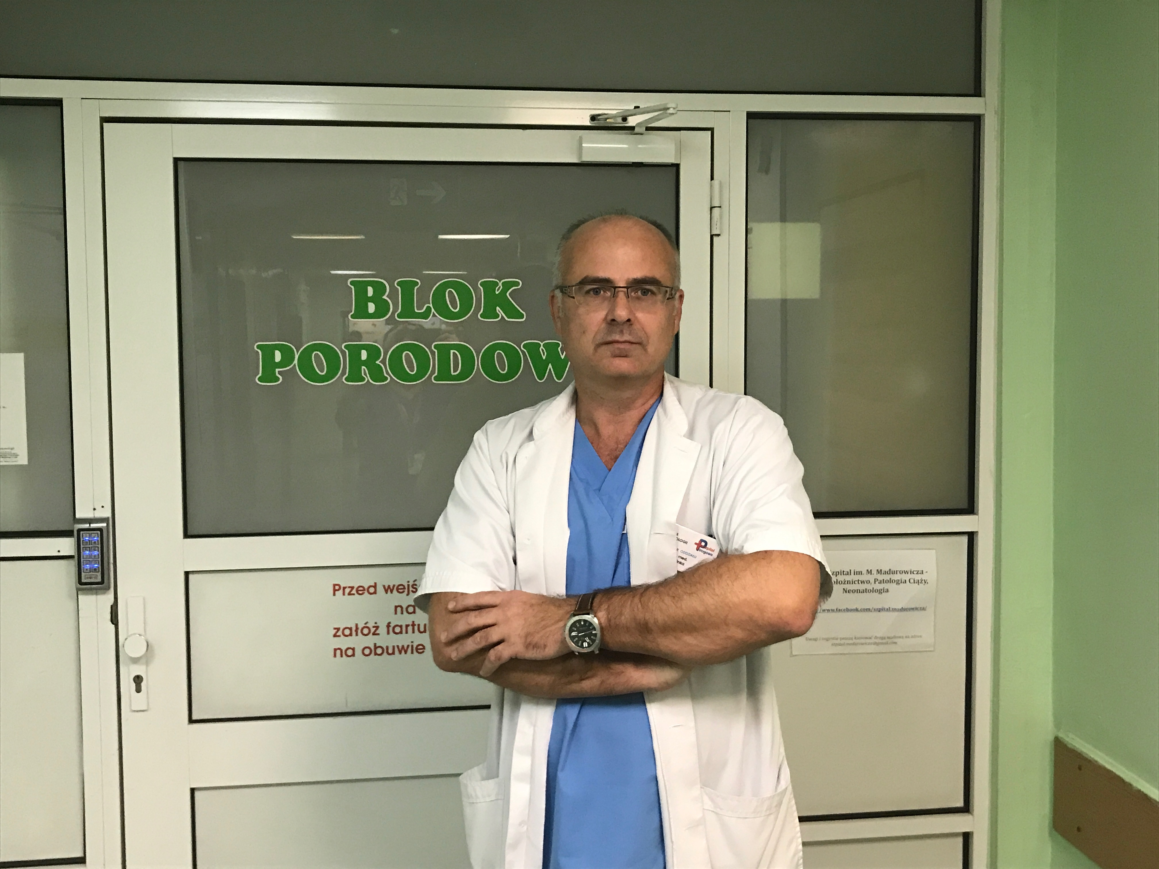 prof. Jarosław Kalinka